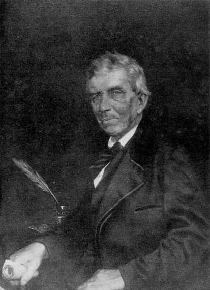 Retrato del pintor vasco-uruguayo Juan Manuel Besnes e Irigoyen.